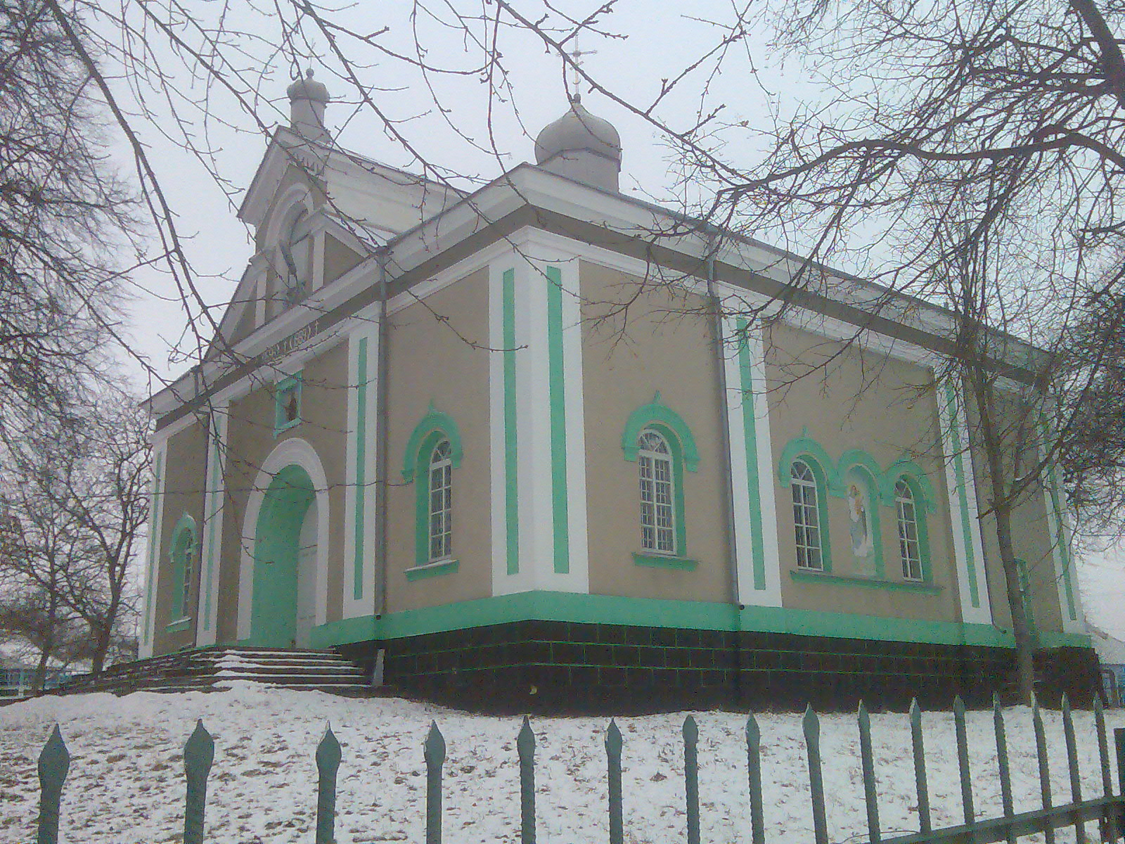 Михайлівська церква, село Демшин